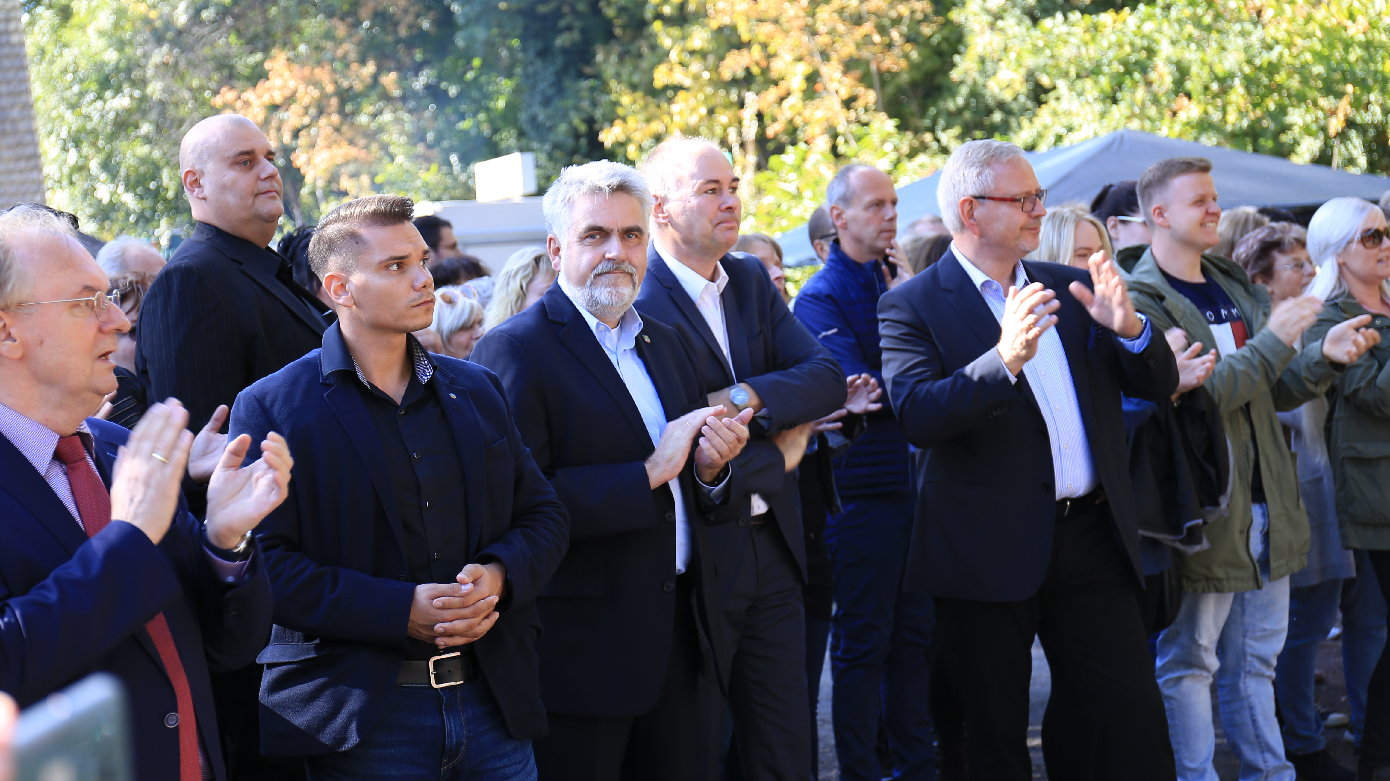 Tierparkfest der Initiative Wir wollen dasselbe - ein friedliches Köthen am 29. September 2018 in Köthen.